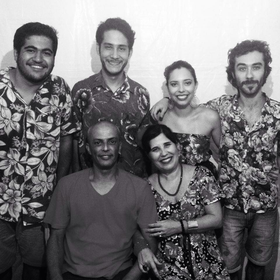 Integrantes do Grupo Paranga no camarim.